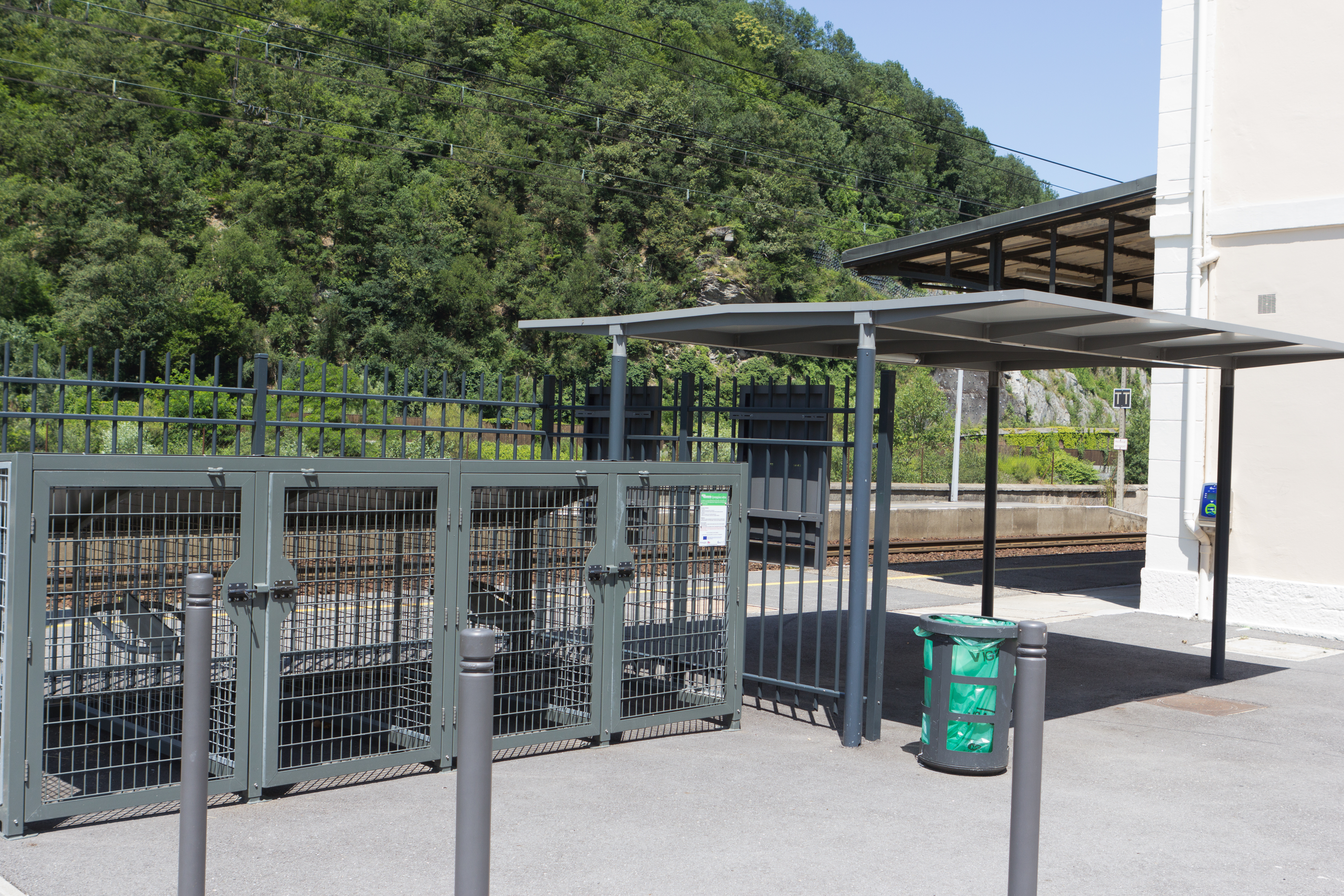 Gare d'Épierre-Saint-Léger, commune d'Épierre, département de la Savoie, France